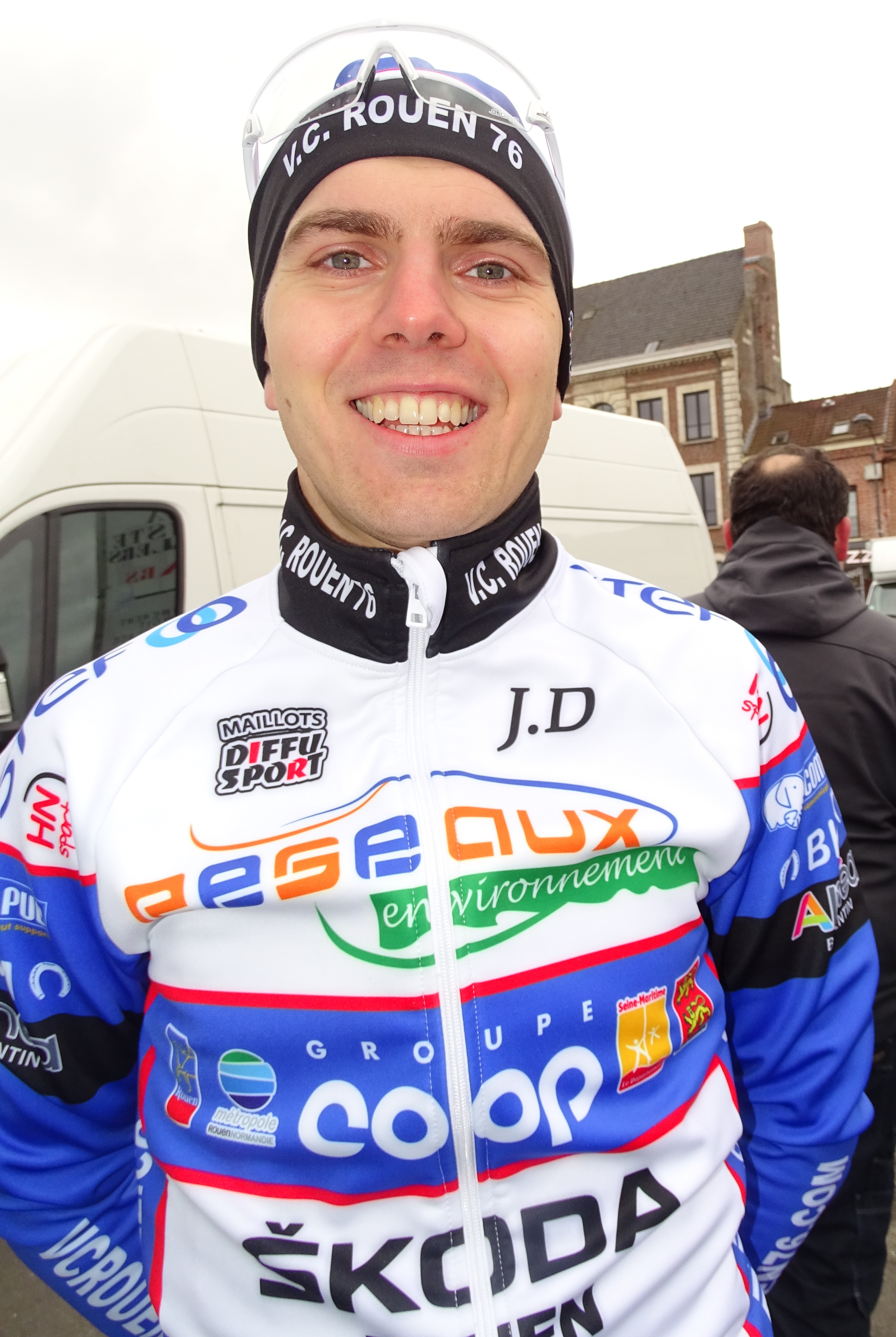 Reportage réalisé le dimanche 6 mars à l'occasion du départ et de l'arrivée du Grand Prix de Lillers-Souvenir Bruno Comini 2016 à Lillers, Pas-de-Calais, Nord-Pas-de-Calais, France.